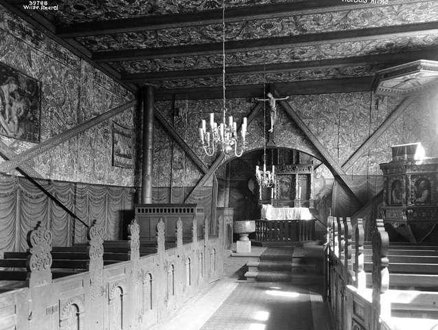 Røldal stavkyrkje invendes i 1933. Tømmerveggjene, som var dekte med kvitmåla panel nokre tiår tidlegare, er no avdekka att og rosemålinga frå 1600-talet dominerer igjen kyrkjerommet. Nedteke er òg galleriet på venstre side, medan fjerninga av panelet i taket har gjeve plass til himlinga over preikestolen igjen. (Sjå file:Røldal_stavkyrkje_interioer_Lindahl.jpeg) Over korbogen heng krusefikset som so mange reiste lange vegar for å få røre ved. Jonsoknatta skulle det sveite undergjerande dråpar.